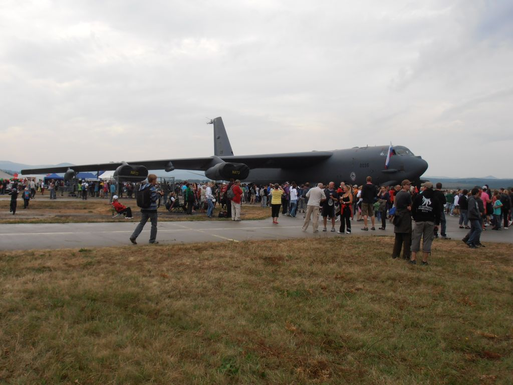 Boeing B-52H-BW Stratofortress z Barksdaleovej leteckej základne v Louisiane na leteckej základni Sliač počas leteckých dní SIAF 2012. Ide o prvú návštevu tohto typu lietadla na Slovensku.